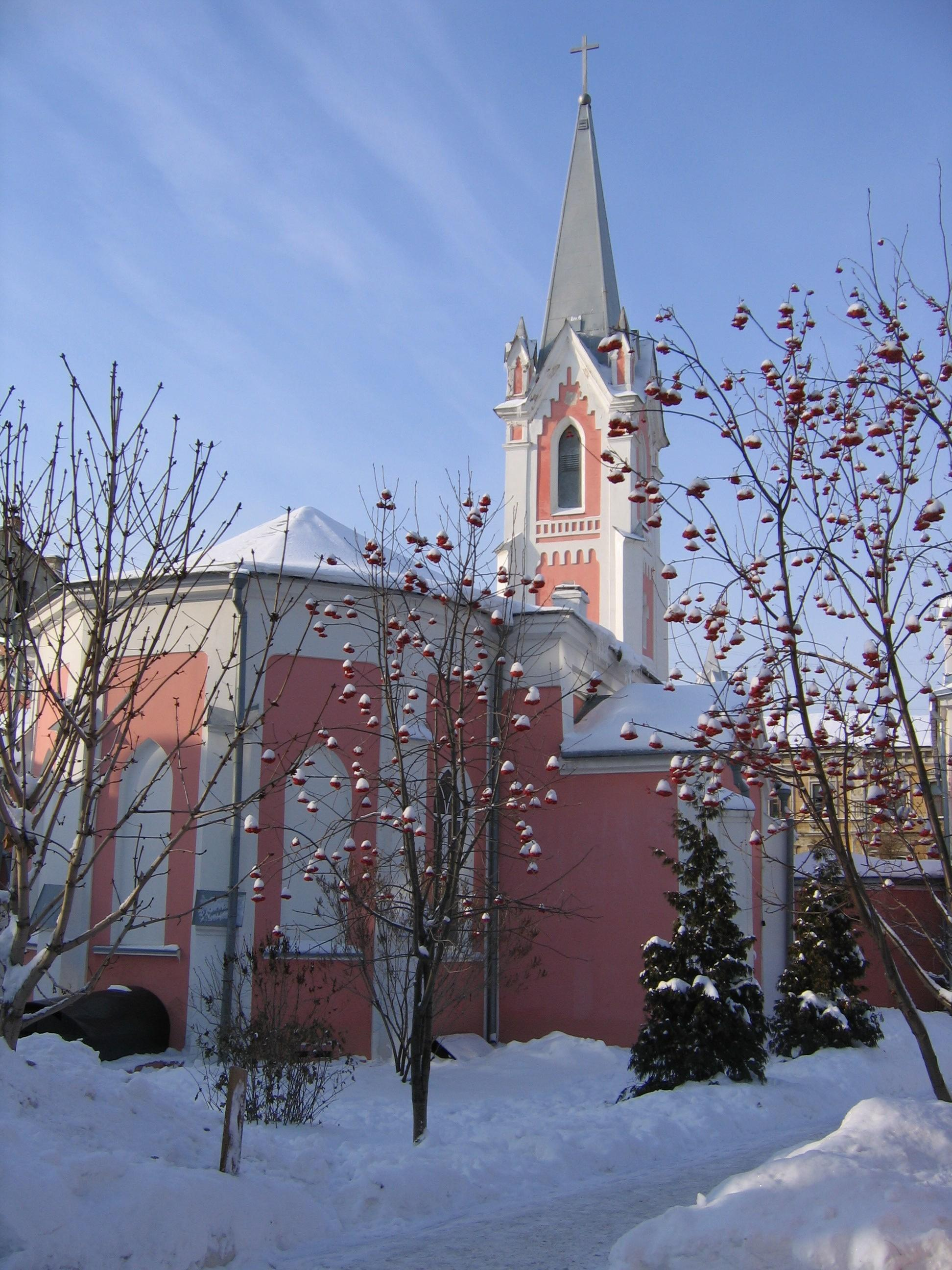 St.Georg Kirche in Samara